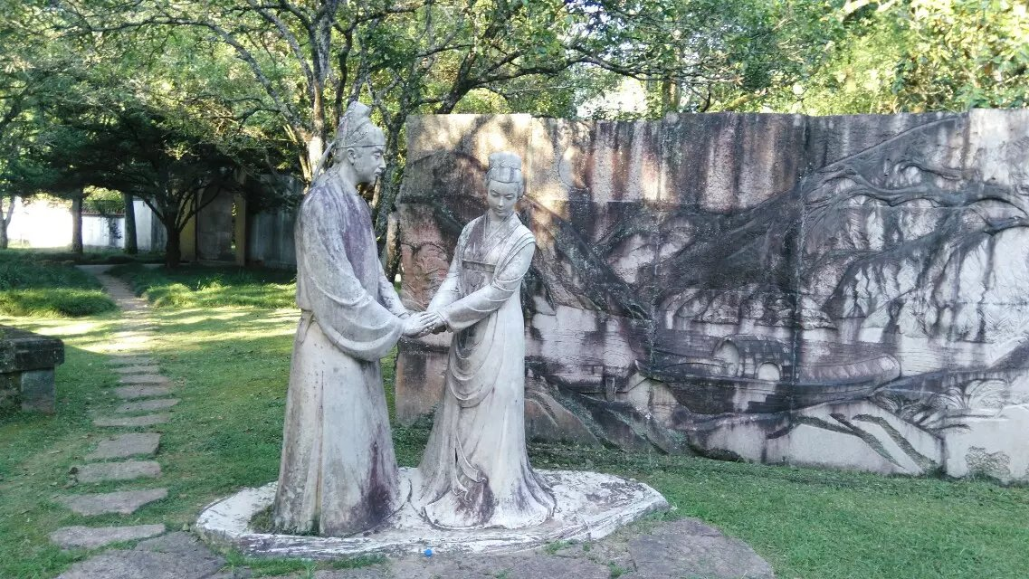 柳永和歌妓大理石像，保存于武夷山国家风景名胜区柳永纪念馆（武夷山市）。